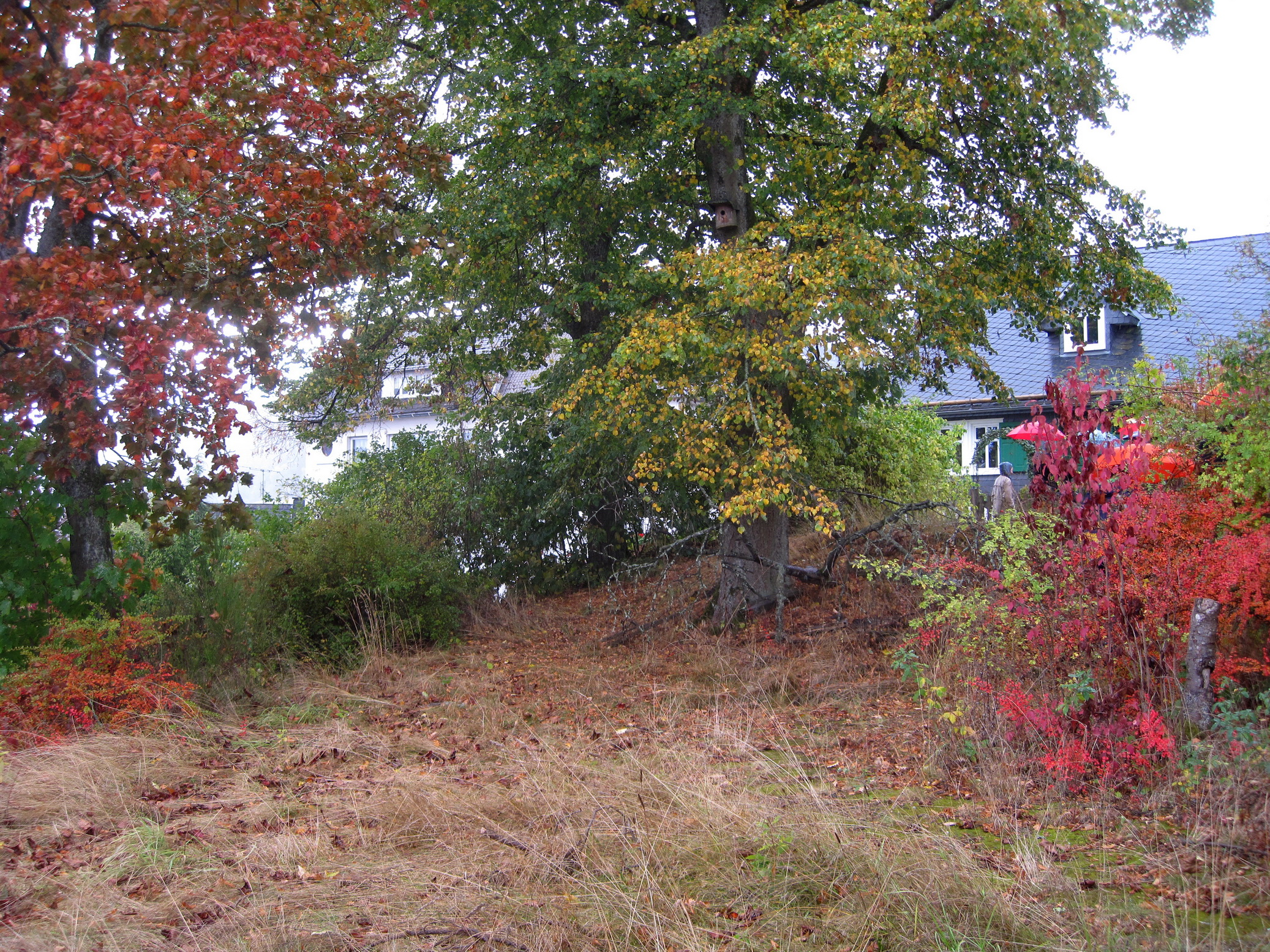 Bergsporn "Auf der Burg", die höchste Erhebung der Altstadt Hallenbergs, Hier siedelten sich im Jahr 1231 die ersten Hallenberger an. Der Platz war damals von drei Seiten gut einsehbar. Sie errichteten an dieser Stelle ein Gebäude und legten damit den Grundstein für die Stadt.